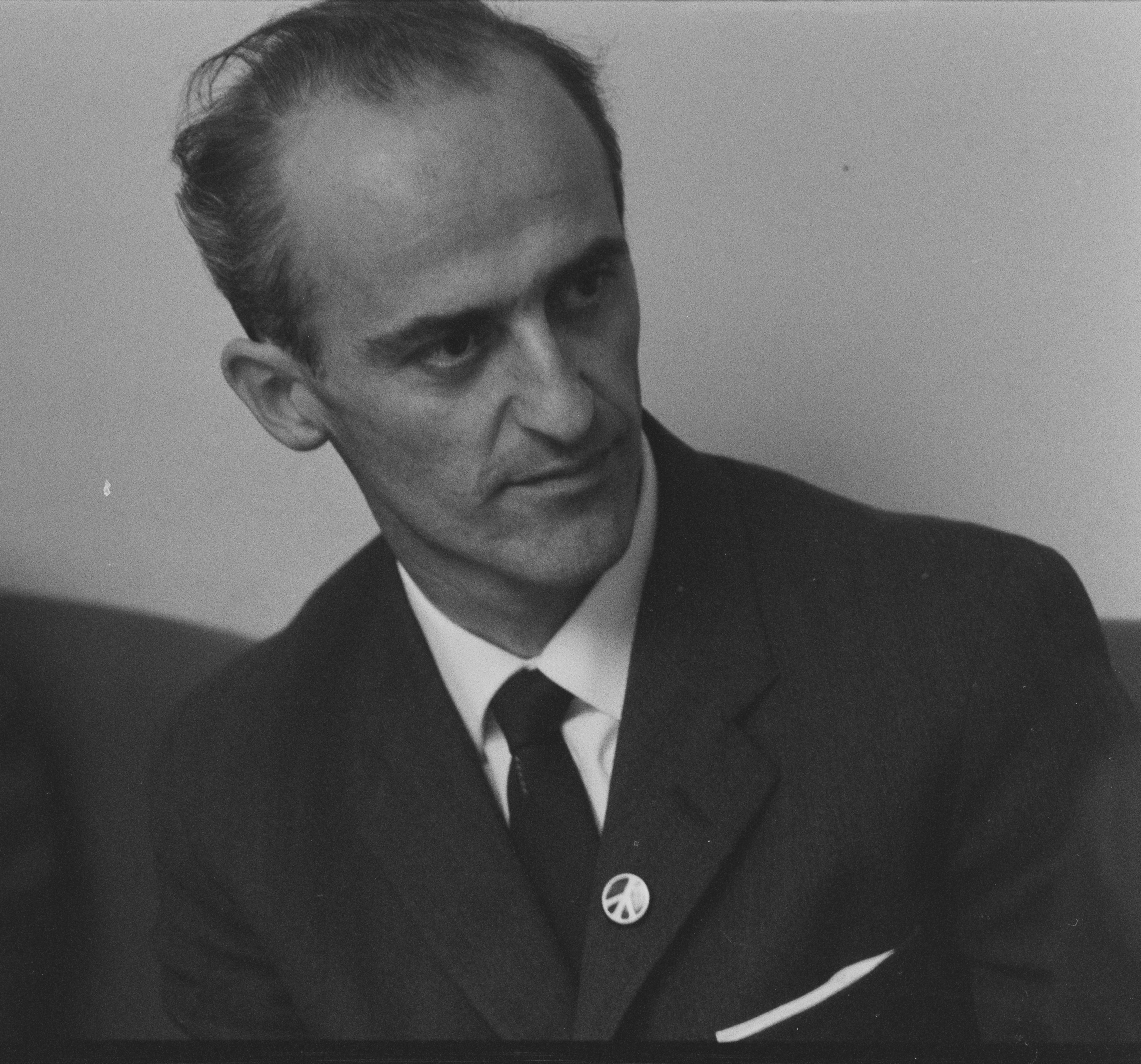 Finn Gustavsen, SF-politiker. Bildet er hentet fra Arkivverket. Regjeringen Lyngs siste dag, fra debatten i Stortinget Arkivinstitusjon : Riksarkivet Arkivnavn : Billedbladet NÅ Sted : Norge, Oslo, Oslo, Stortinget Emneord: Regjeringer, Lyng Avbildet